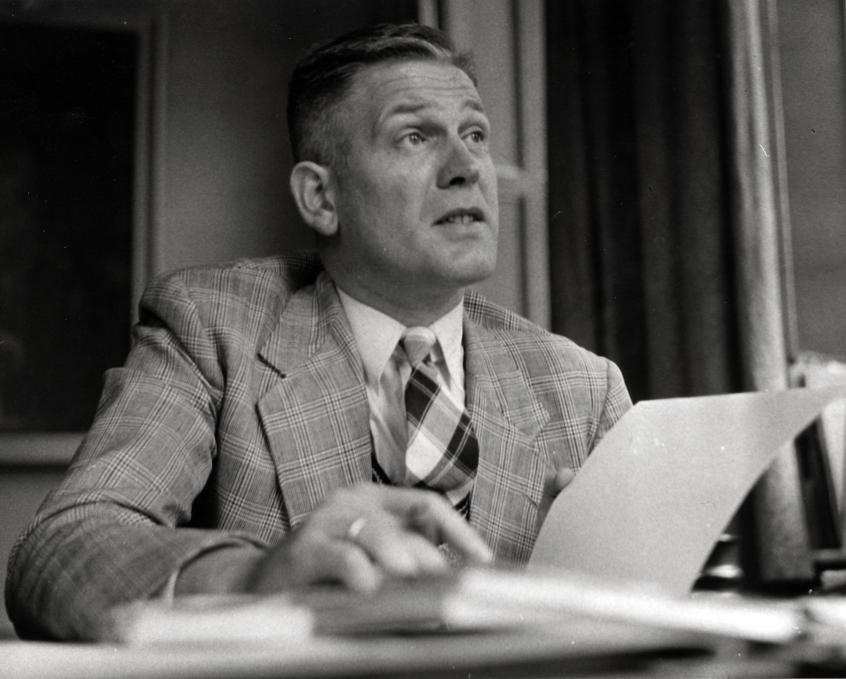 Burgemeester Van Tuinen van Dokkum. Nederland, 1953.